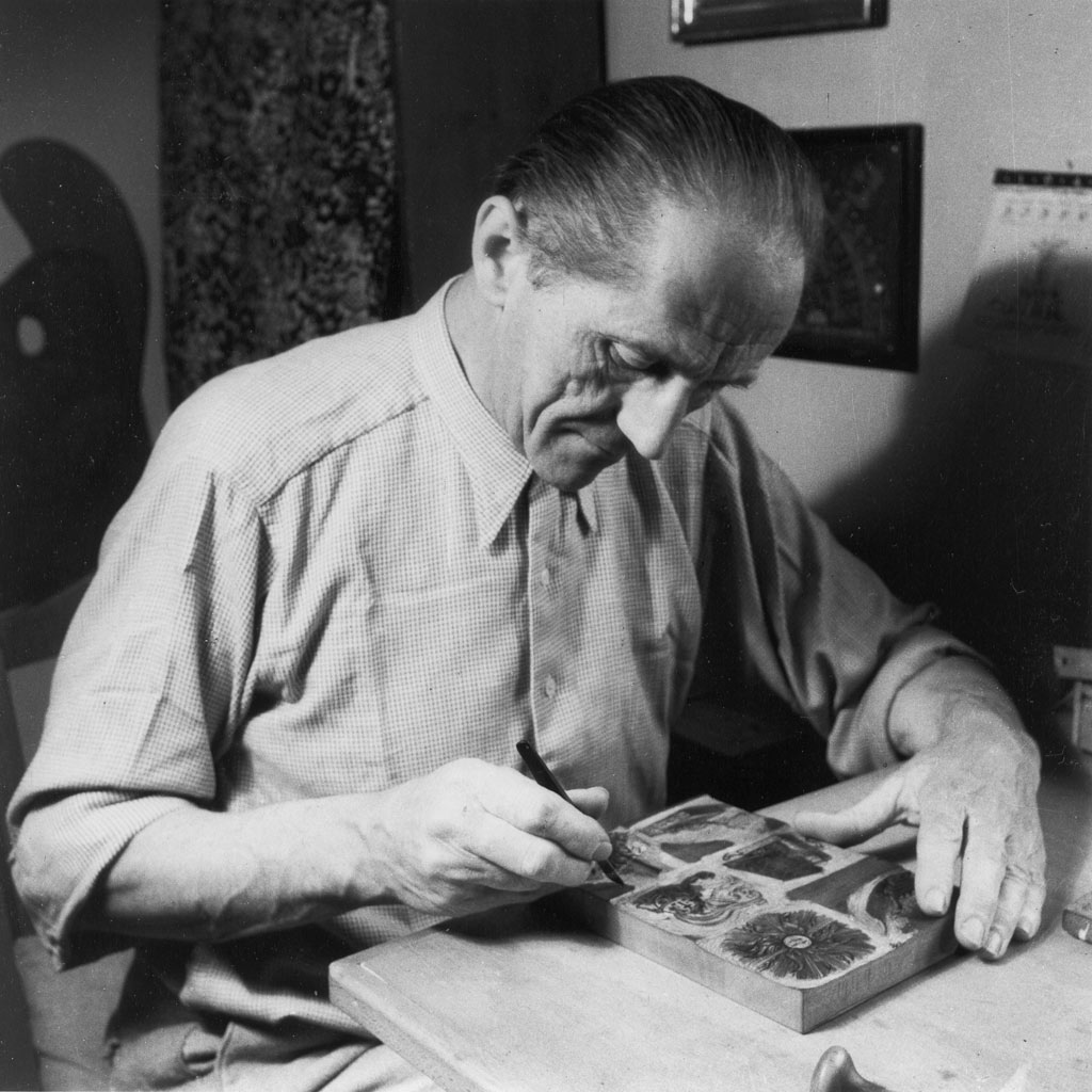 Josua Leander Gampp bei der Arbeit an einem Holzschnitt